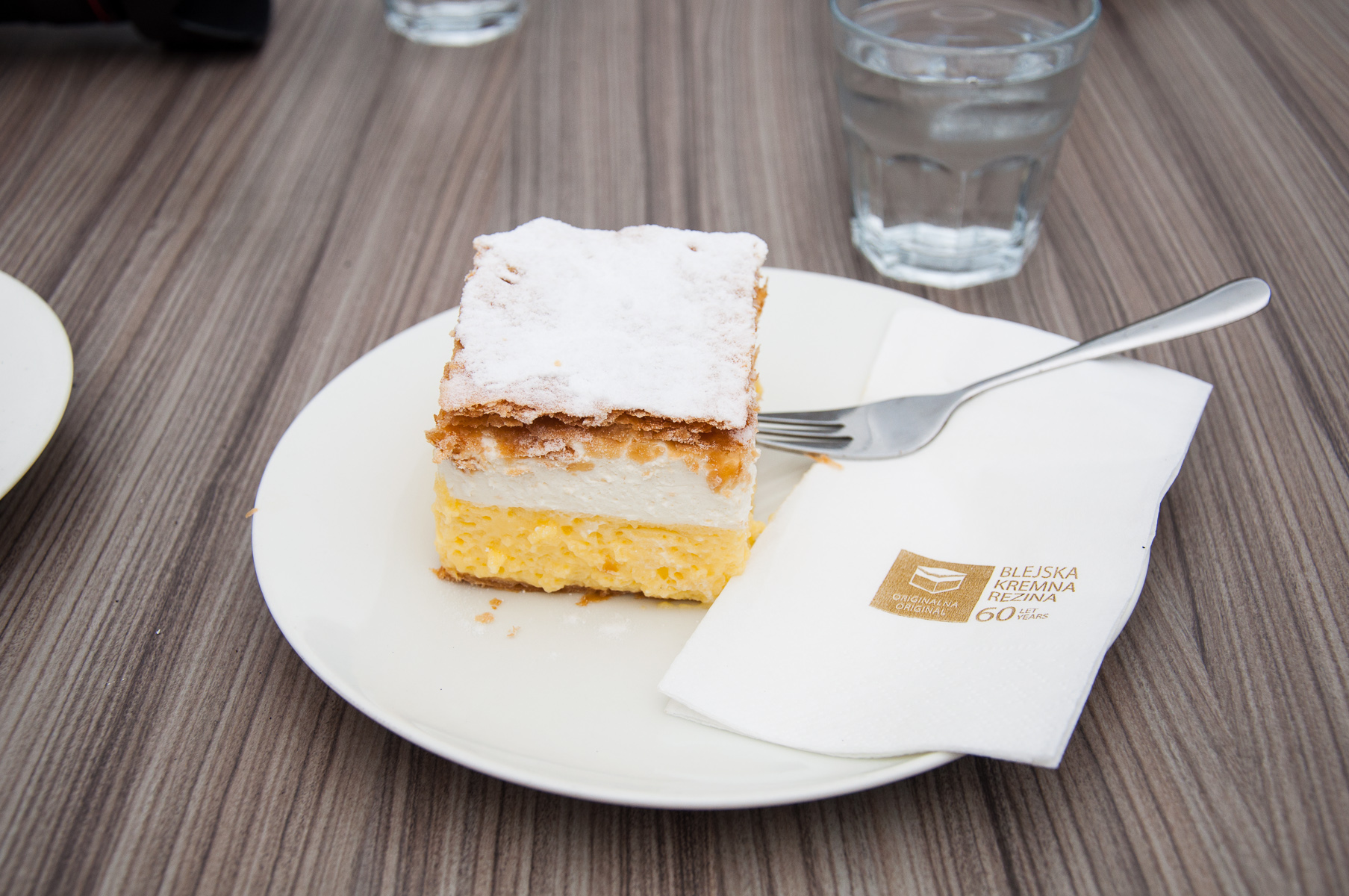 Kremna rezina